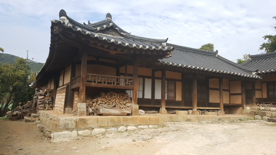 경기도 군포시 속달동에 위치한 동래정씨 동래군파 종택이다.